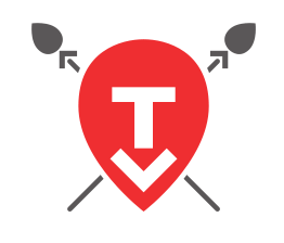 Tagzaniaren logoa